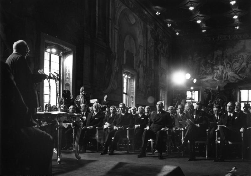 29. Mai 1967 Aus Anlaß des 10. Jahrestages der Unterzeichnung der "Römischen Verträge" werden die bisher erzielten Ergebnisse als beispielloser Erfolg in der Geschichte der internationalen Zusammenarbeit gewürdigt. im Bild: Feierstunde auf dem Kapitol. Italiens Staatspräsident Saragat bei der Festrede im Saal der Horatier und Kuratier. in der ersten Reihe v. l.n.r.: Ministerpräsident de Jong Niederlande Ministerpräsident Werner Luxemburg Ministerpräsident Moro Italien Staatspräsident de Gaulle Frankreich Bundeskanzler Kiesinger Ministerpräsident Boeyantes Belgien